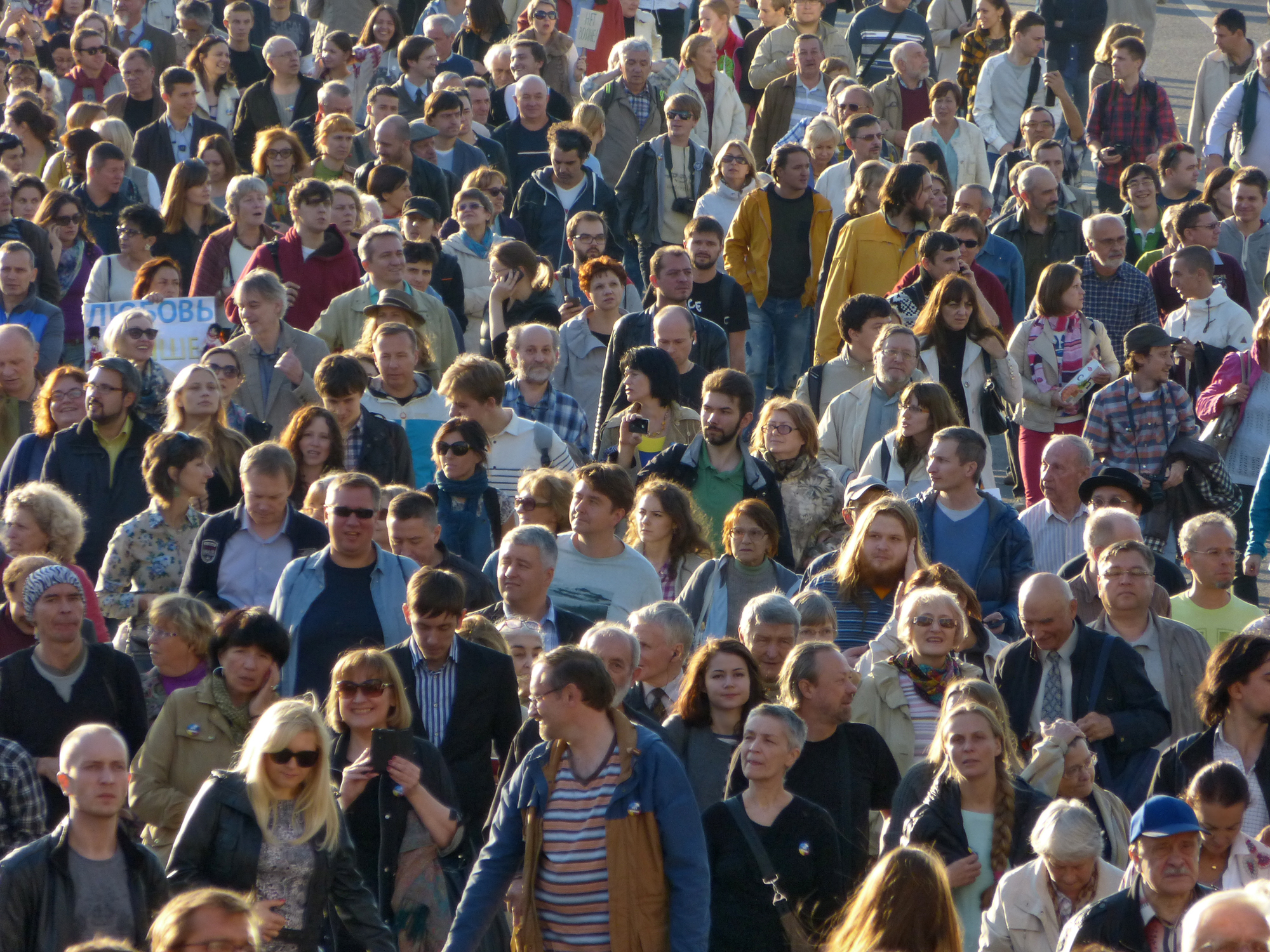 Москва, Бульварное кольцо. Общероссийский марш мира против вторжения путинских войск на Украину.